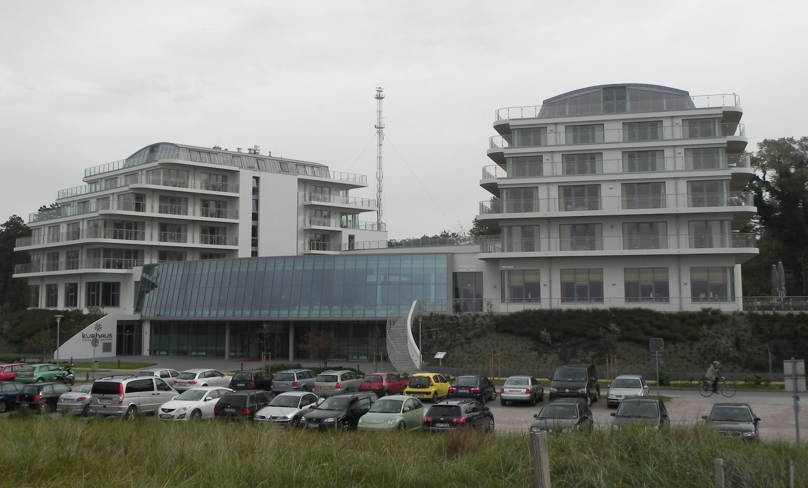 Kurhaus Ahrenshoop, ein Grand-Hotel. Neu erstelltes Gebäude auf dem Platz des ehemaligen Kurhauses von Ahrenshoop